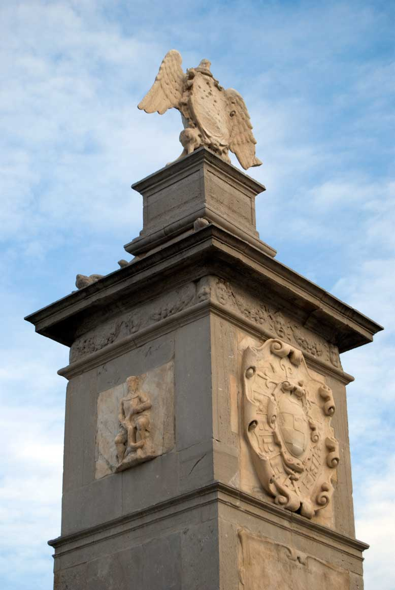 Cippo all'ingresso turistico del Porto di Palermo. Contiene un rilievo raffigurante il Genio di Palermo, detto Genio del Porto.